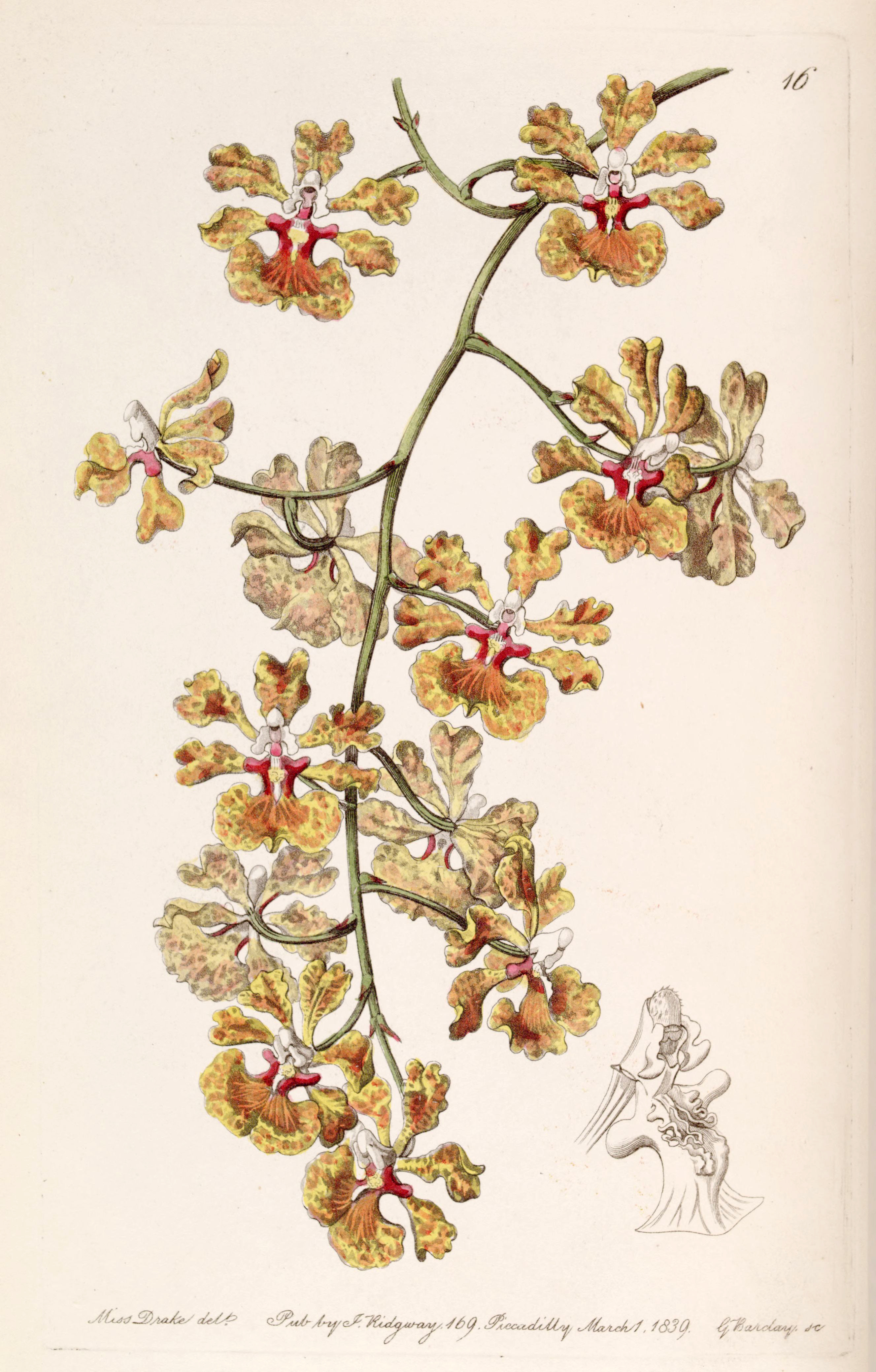 Tolumnia guttata (as syn. Oncidium luridum var. guttatum)